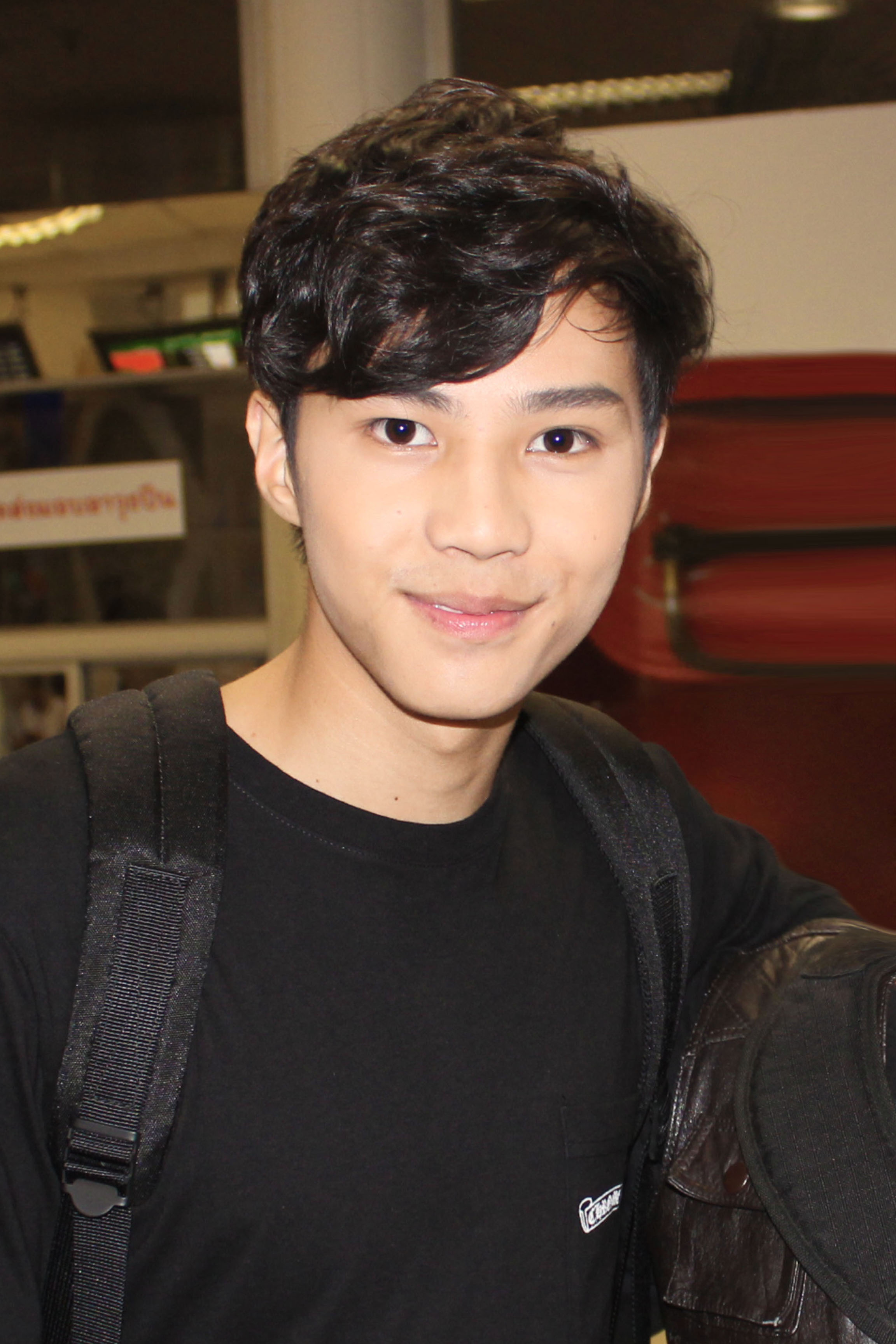 ธิติ มหาโยธารักษ์